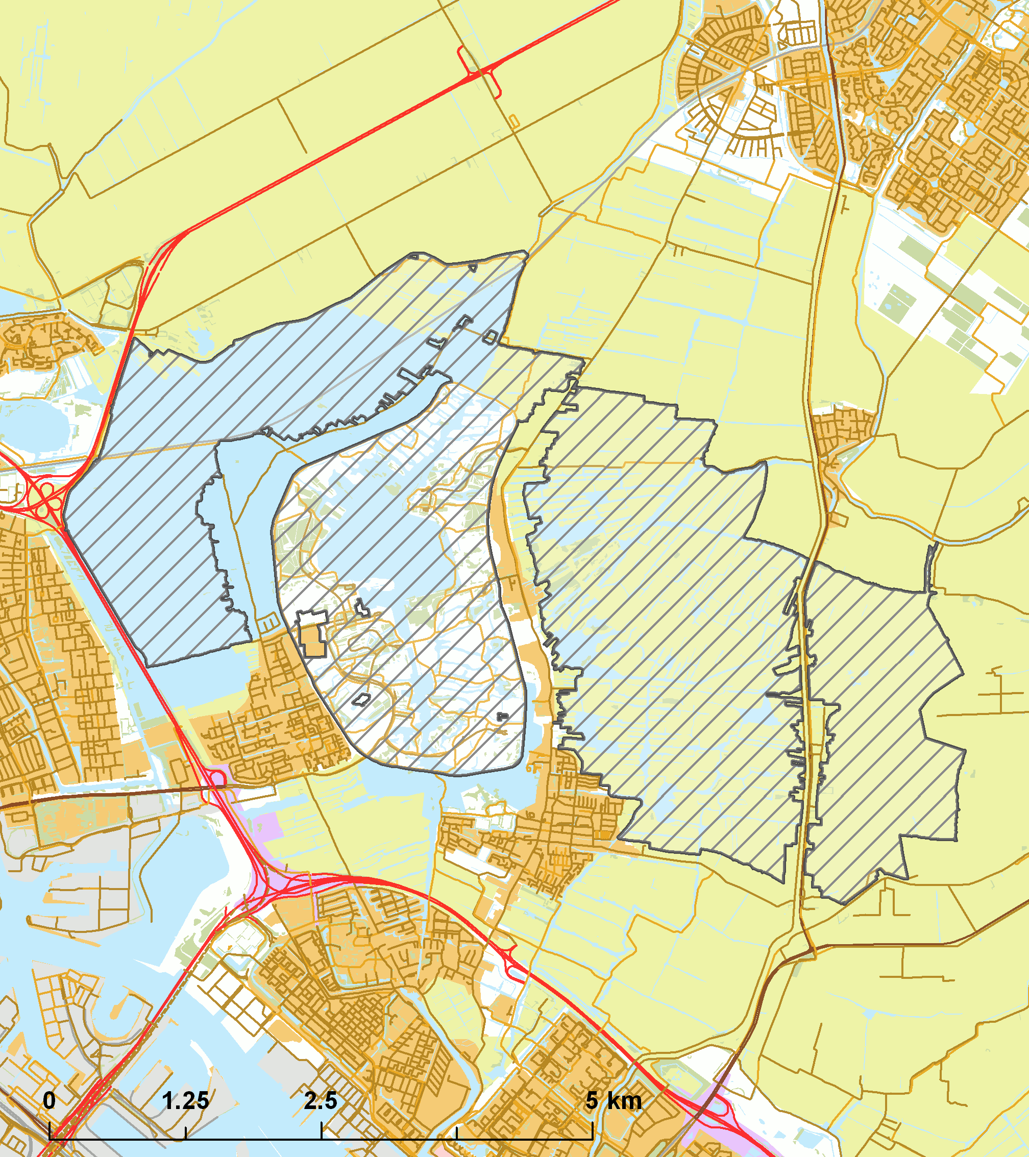 Natura2000 - Ilperveld, Varkensland, Oostzanerveld & Twiske.png